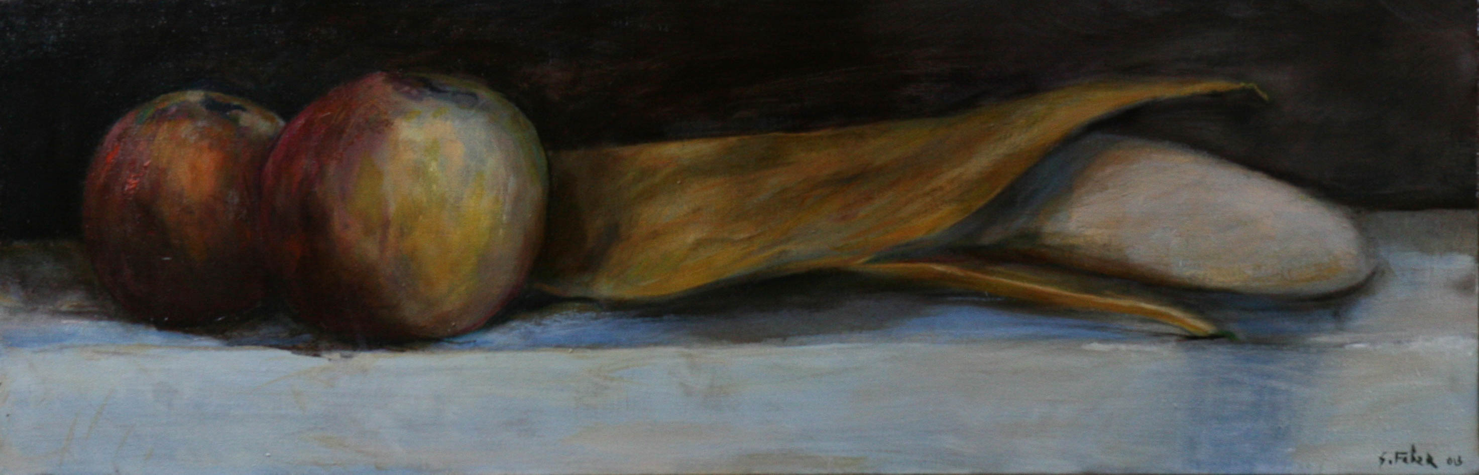 Nature morte